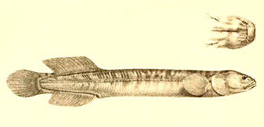 Garde-boue (poisson) (Neochanna apoda)